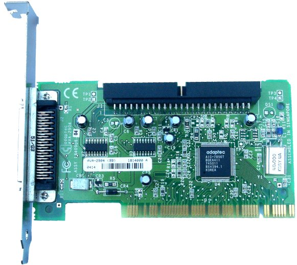 SCSI Adapter: Adaptec AVA-2904 Taget 29. august 2004 af Ysangkok (mig).